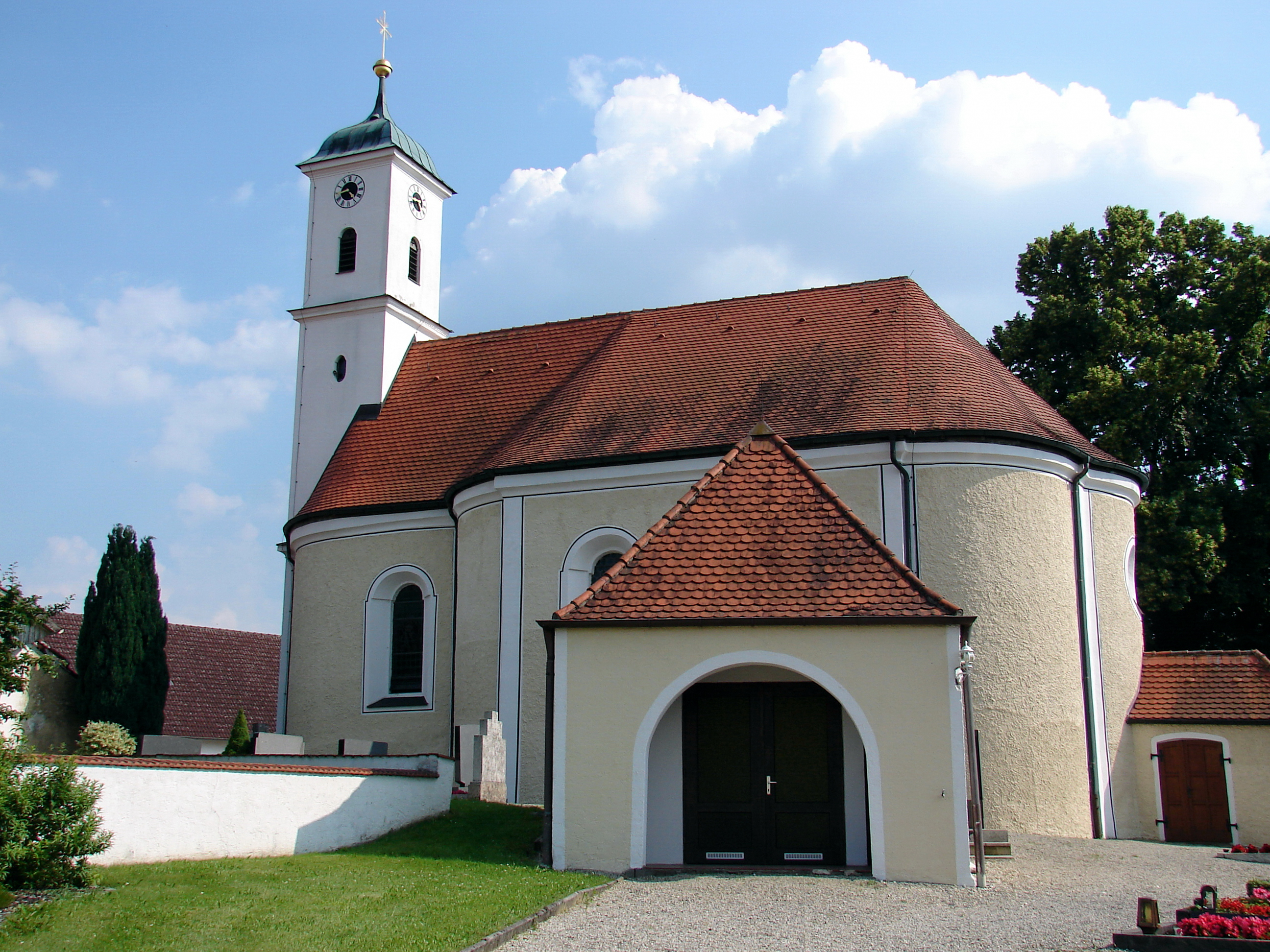 Kath. Filialkirche St. Koloman